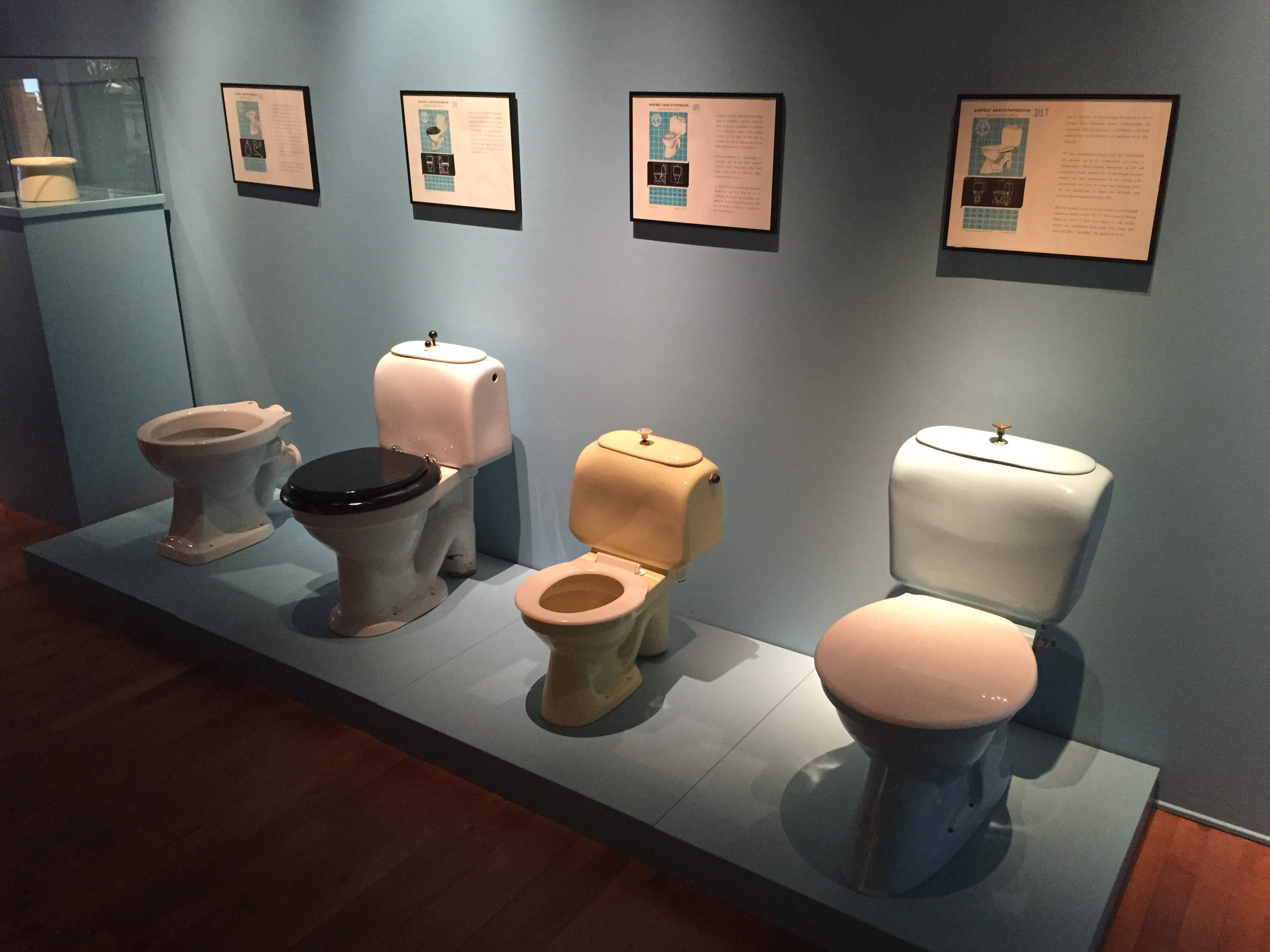 Fyra olika toalettmodeller från Gustavsbergs porslinsfabrik. Utställda på Gustavsbergs porslinsmuseum.